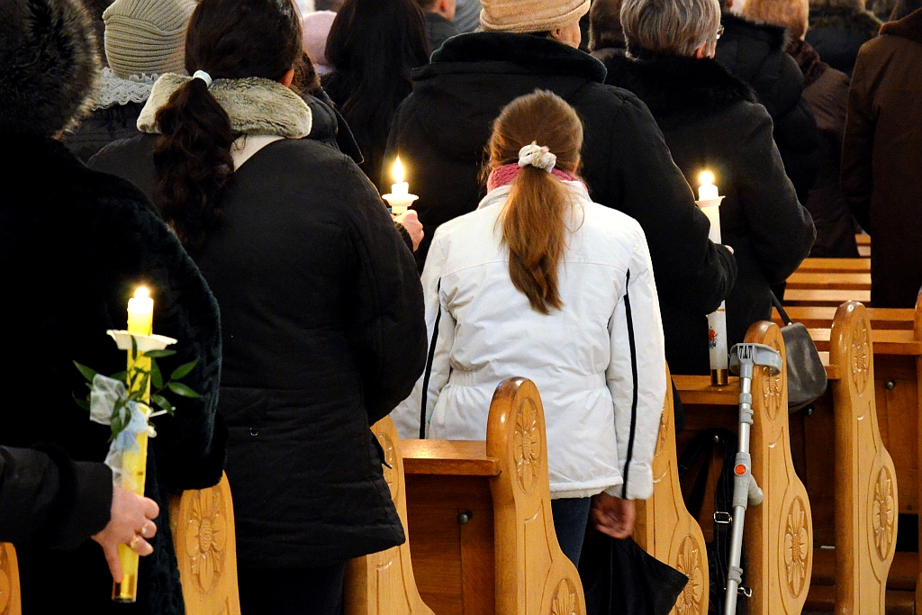 Kerzen zur Mariä Lichtmess